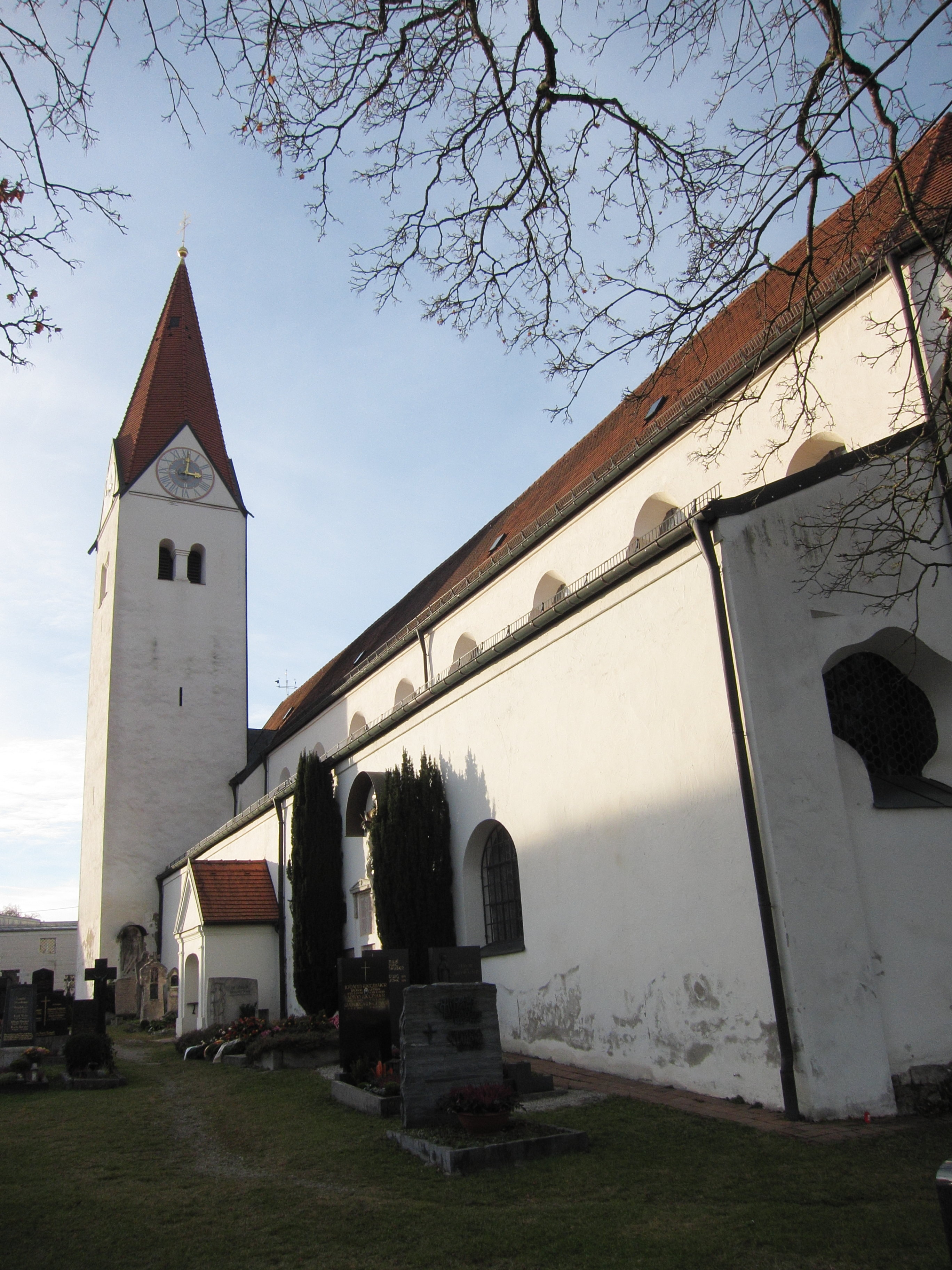 Ehem. Kollegiatsstiftkirche, jetzt Katholische Pfarrkirche St. Zeno, dreischiffige Pfeilerbasilika mit Krypta und drei Apsiden nach dem Vorbild des Freisinger Domes um 1200 errichtet, Turm und westliche Vorhalle Anfang 15. Jahrhundert, Barockisierung 1697-1701 und um 1730; mit Ausstattung